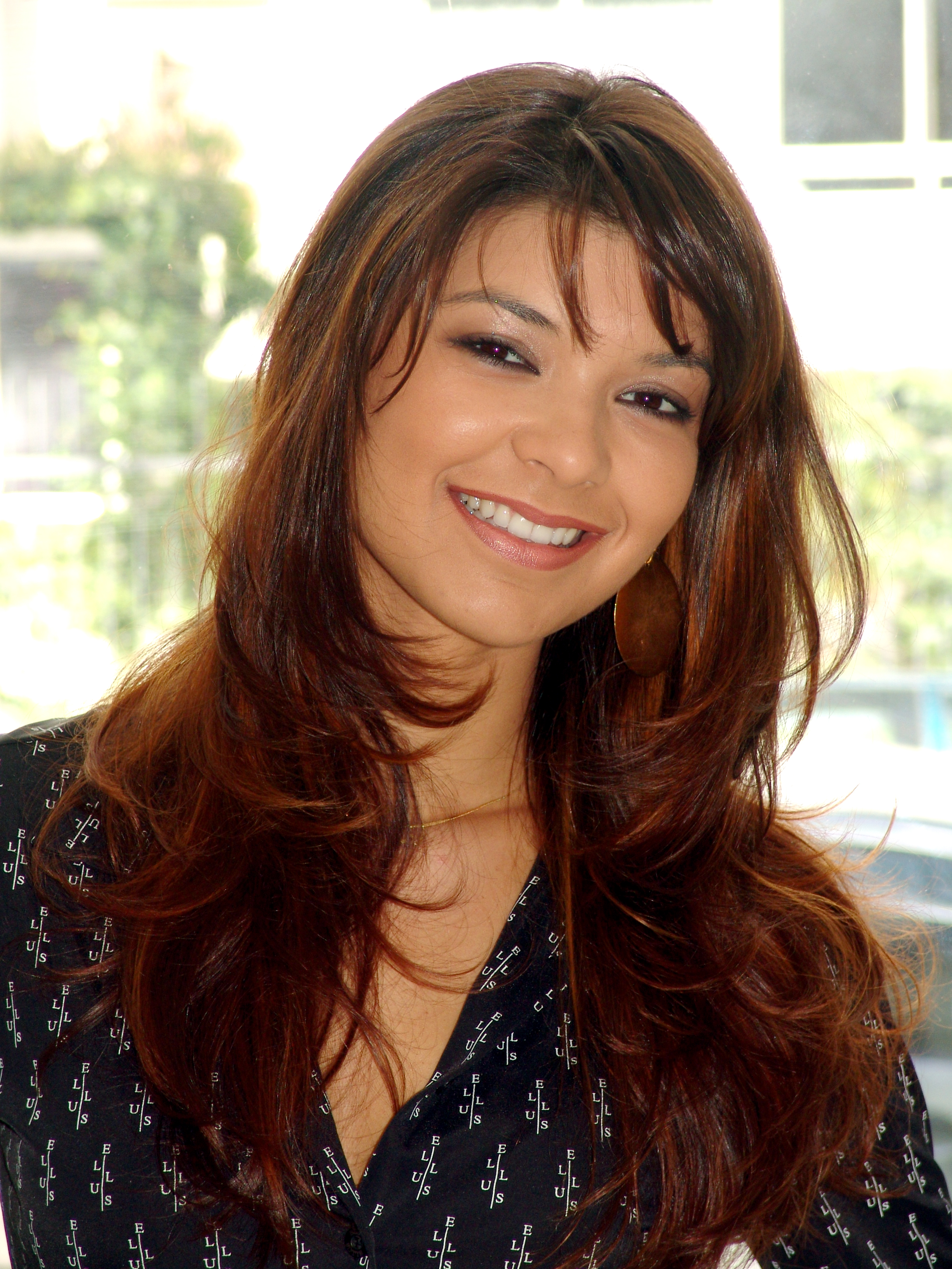 Amanda Françozo